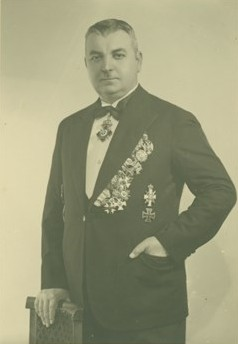 Снимка на генерал Гурко Мархолев.